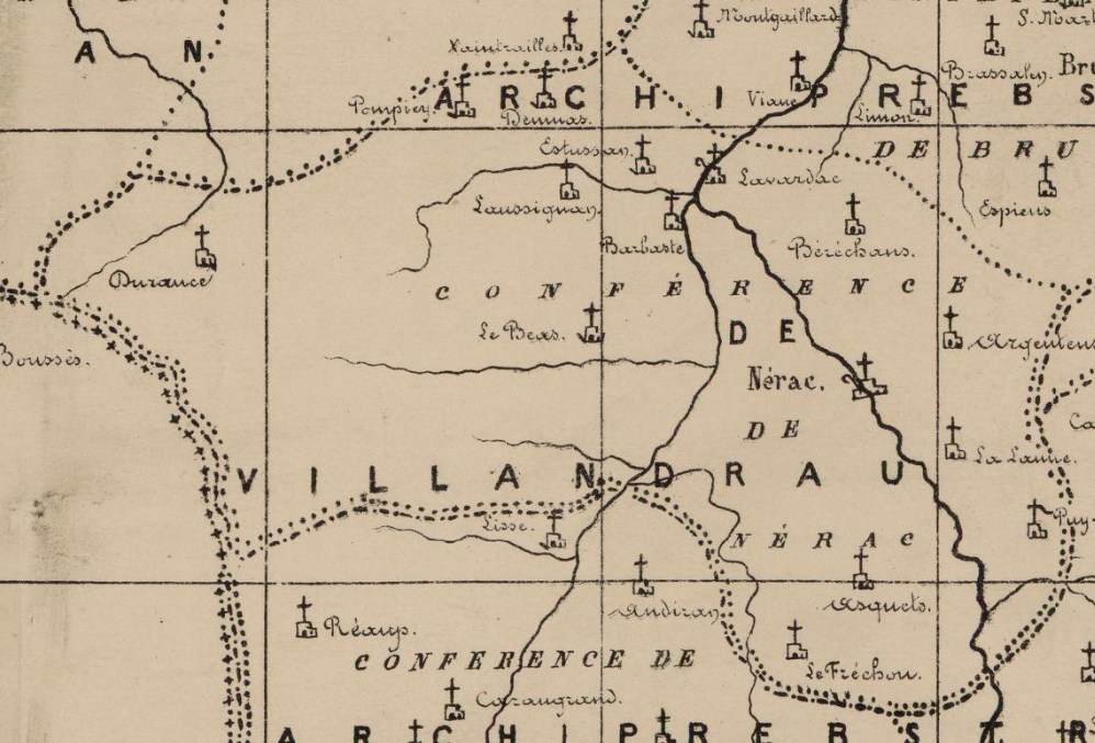 Extrèit de la mapa de la diocèsi de Condòm: Jean-Marie Cazauran (1845-1910). Diocèse de Condom au XVIIe siècle.